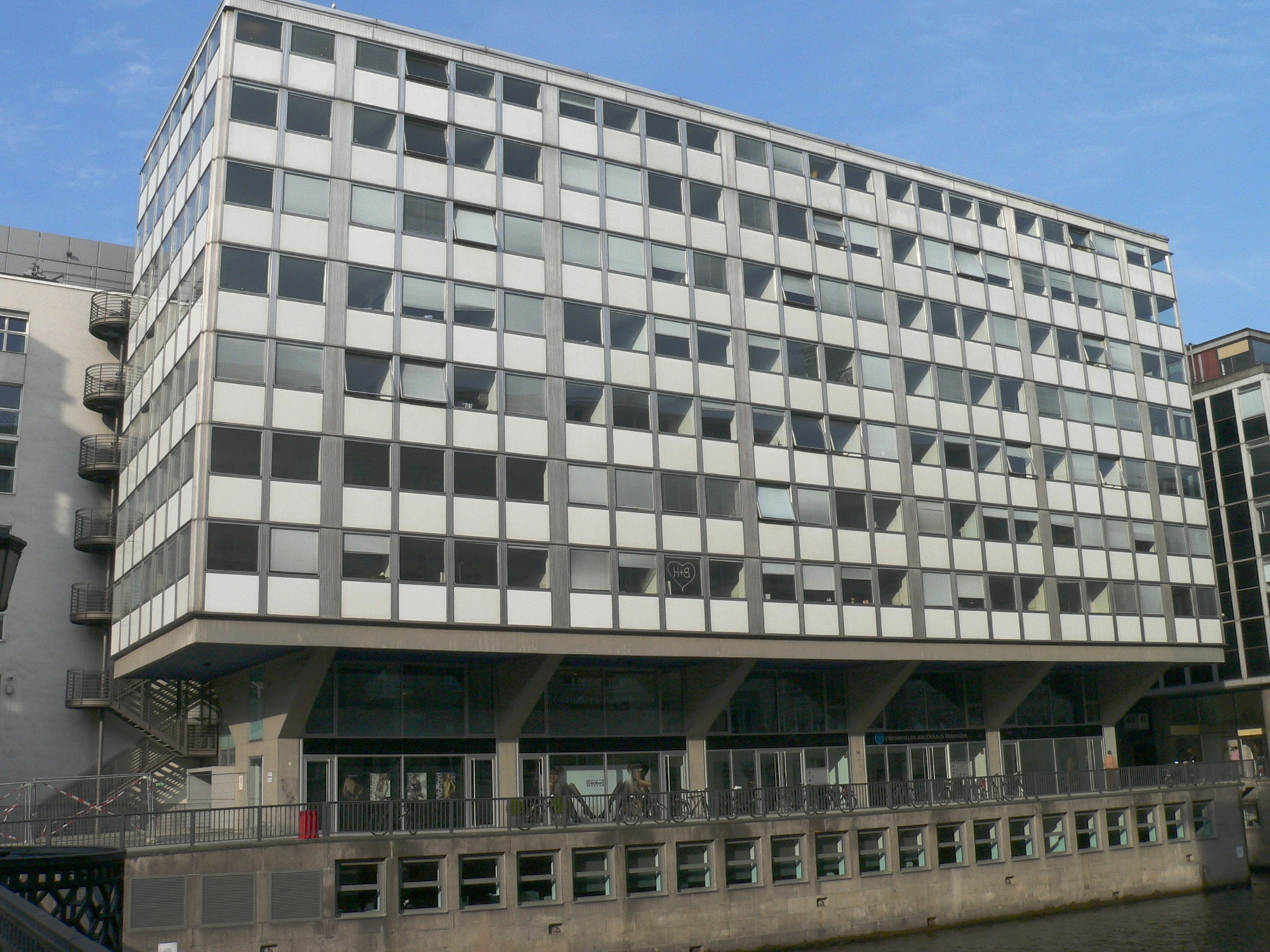 Nuer Wall 43 Geschäftshaus 1958 Fleetseite Entwurf: Godber Nissen